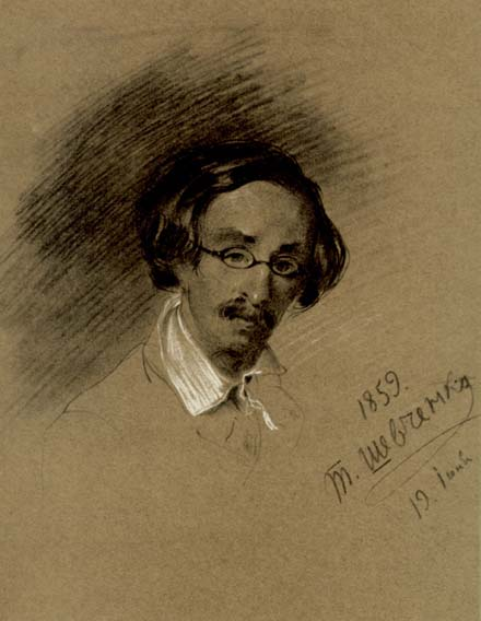 Портрет М.О.Максимовича (Папір, італійський олівець, крейда)